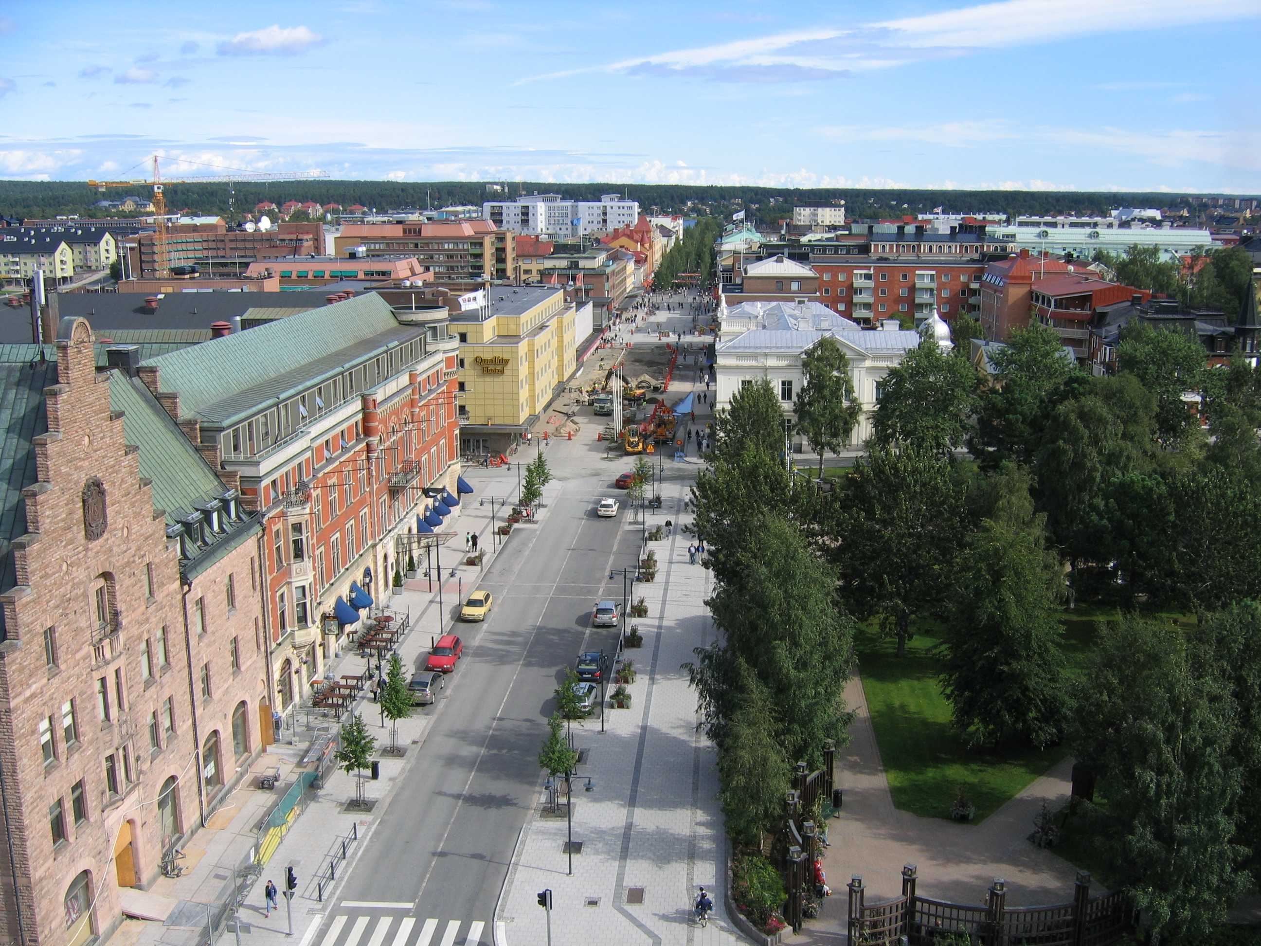 Luleå, taken 16/08/2005